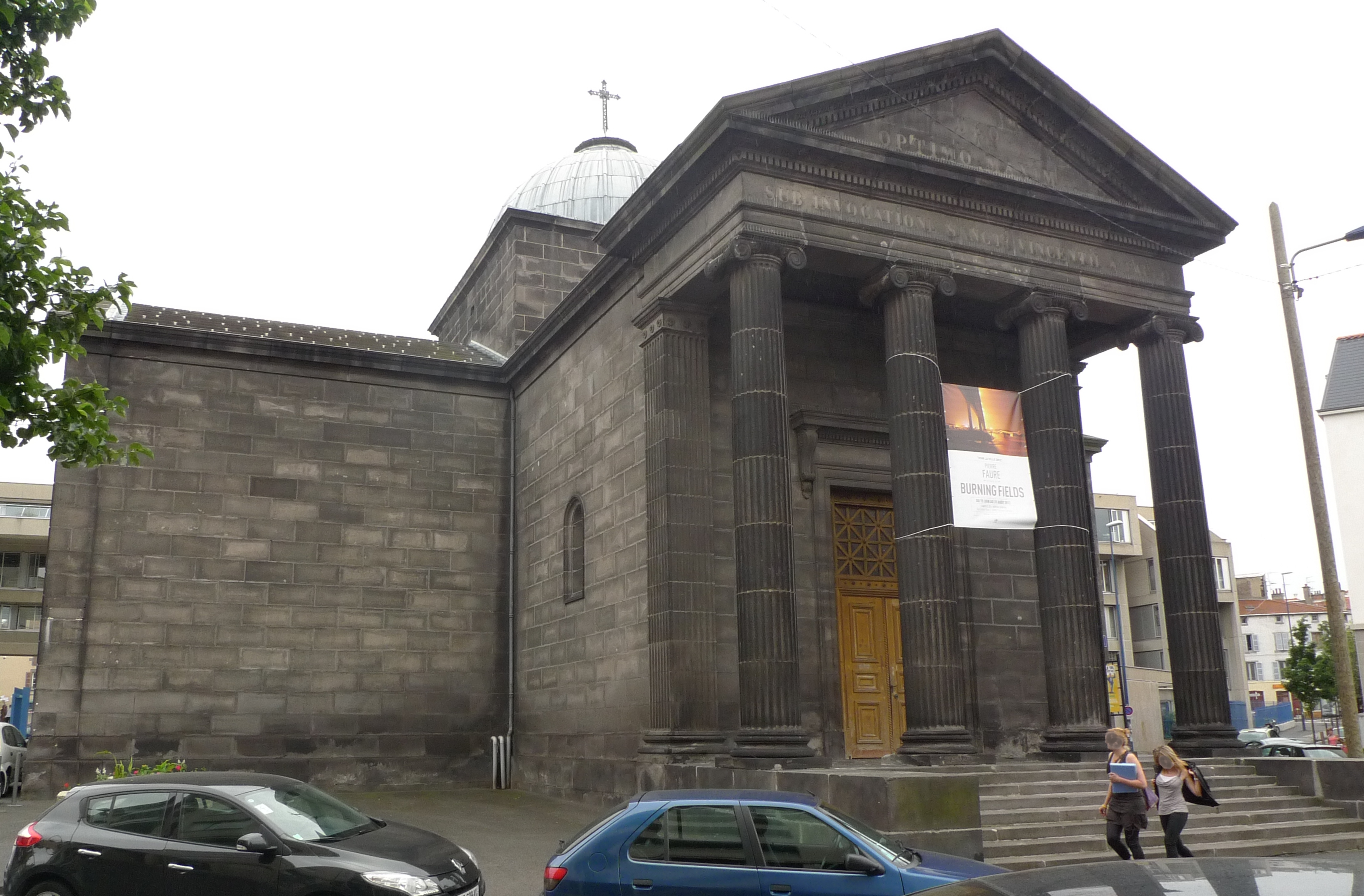 vue extérieure depuis la rue Sainte Rose